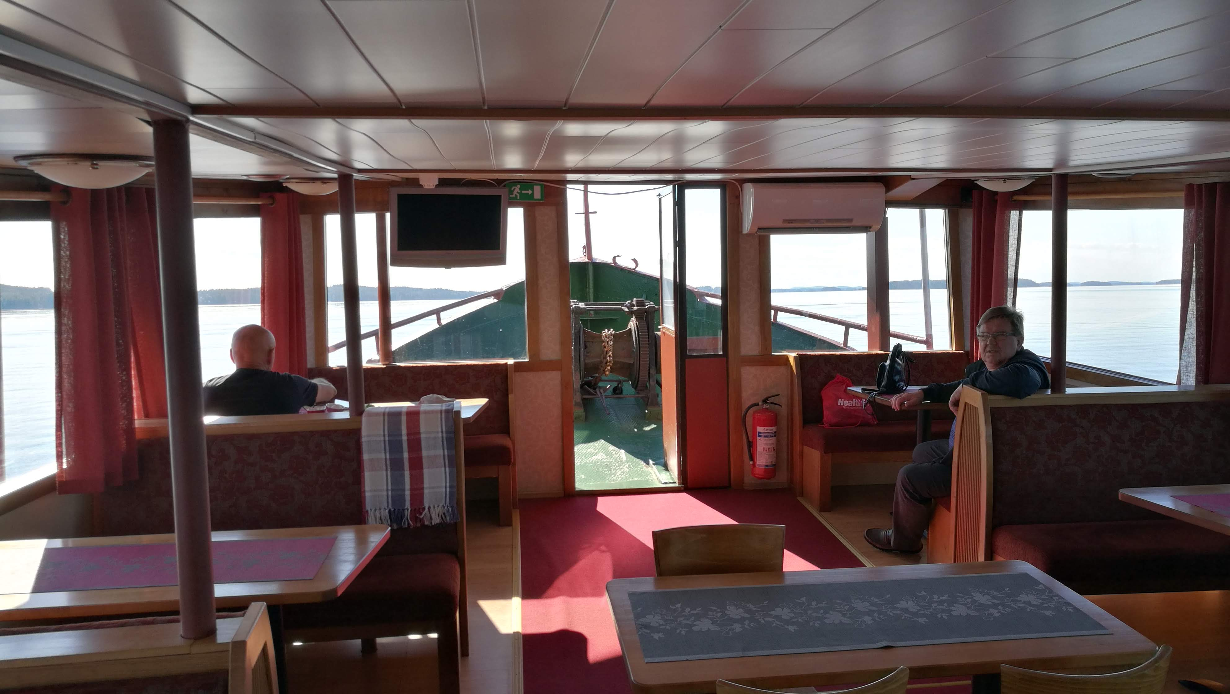 M/S Puijon ravintolaa keulaan päin. 2018 Heinäkuu.